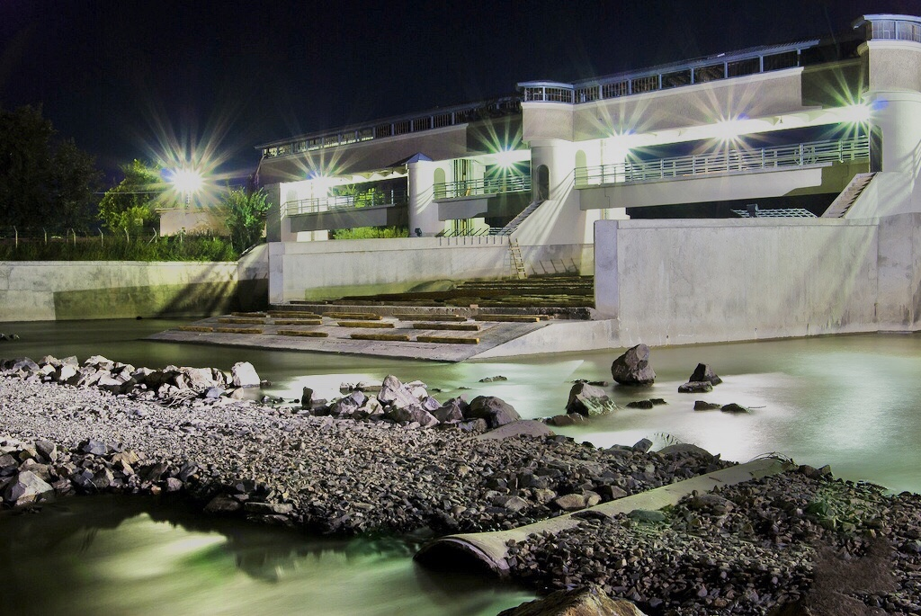 Digul din Targu Mures